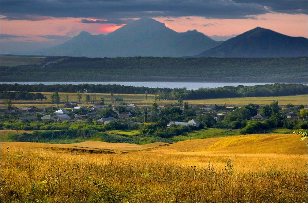 Этоко на фоне Пятигорья